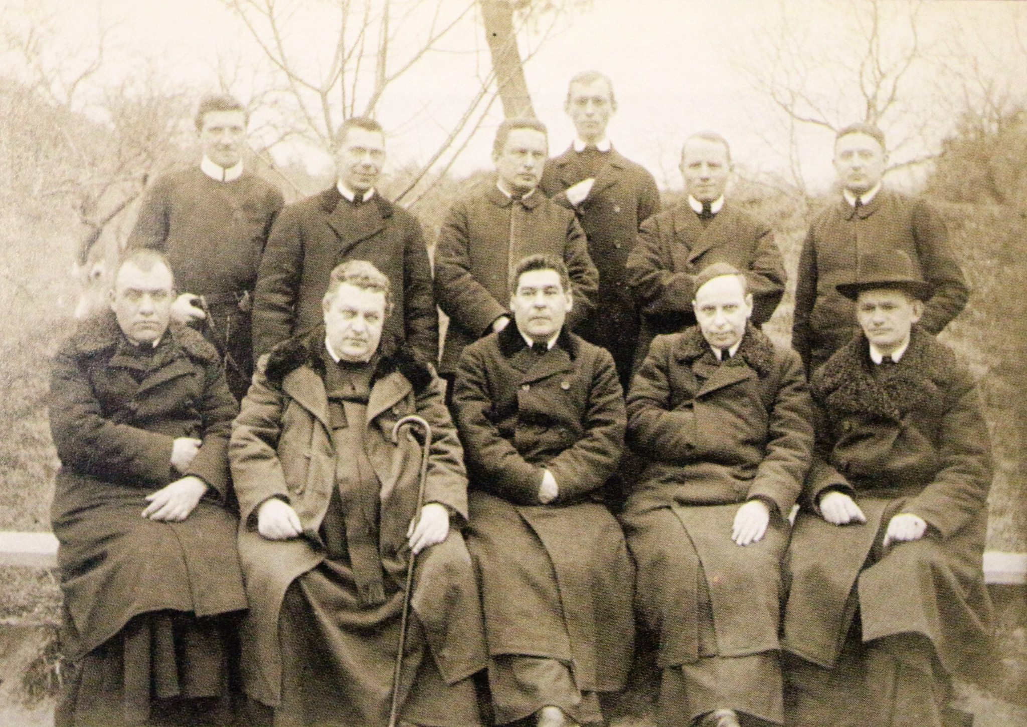 На фото : Сидять (зліва направо) отці Віталій Градюк, Єронім Малицький, Платонід Філяс, Мелетій Лончина, Онуфрій Бурдяк. Стоять редемпторист о. Франц Ксаверій Бонн, о. Порфирій Боднар, о. Мар'ян Повх, далі - отці Степан Решетило, Діонізій Ткачук та Ігнатій Погорецький.